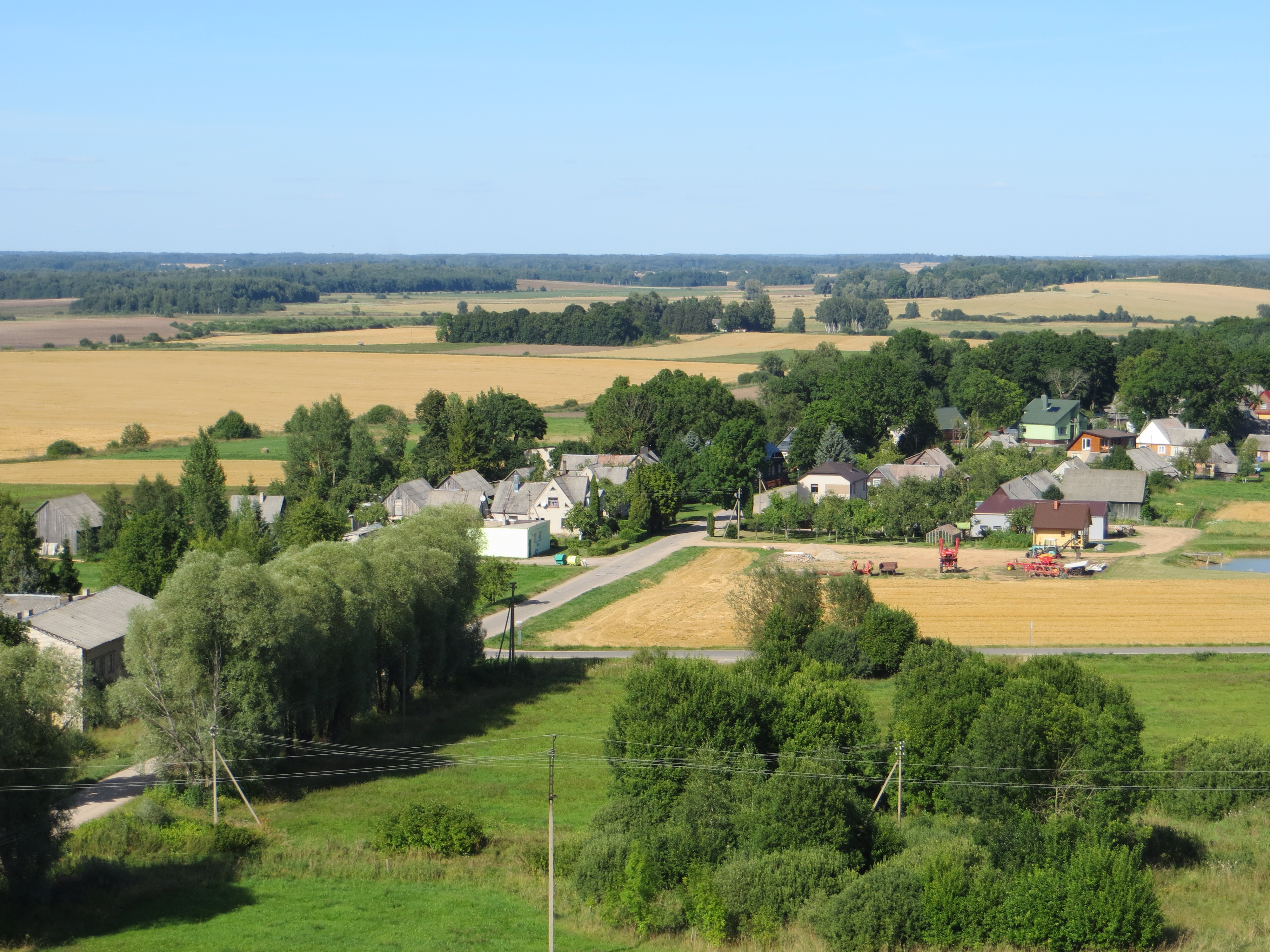 Kunigiškiai II, Lithuania